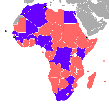 خريطة